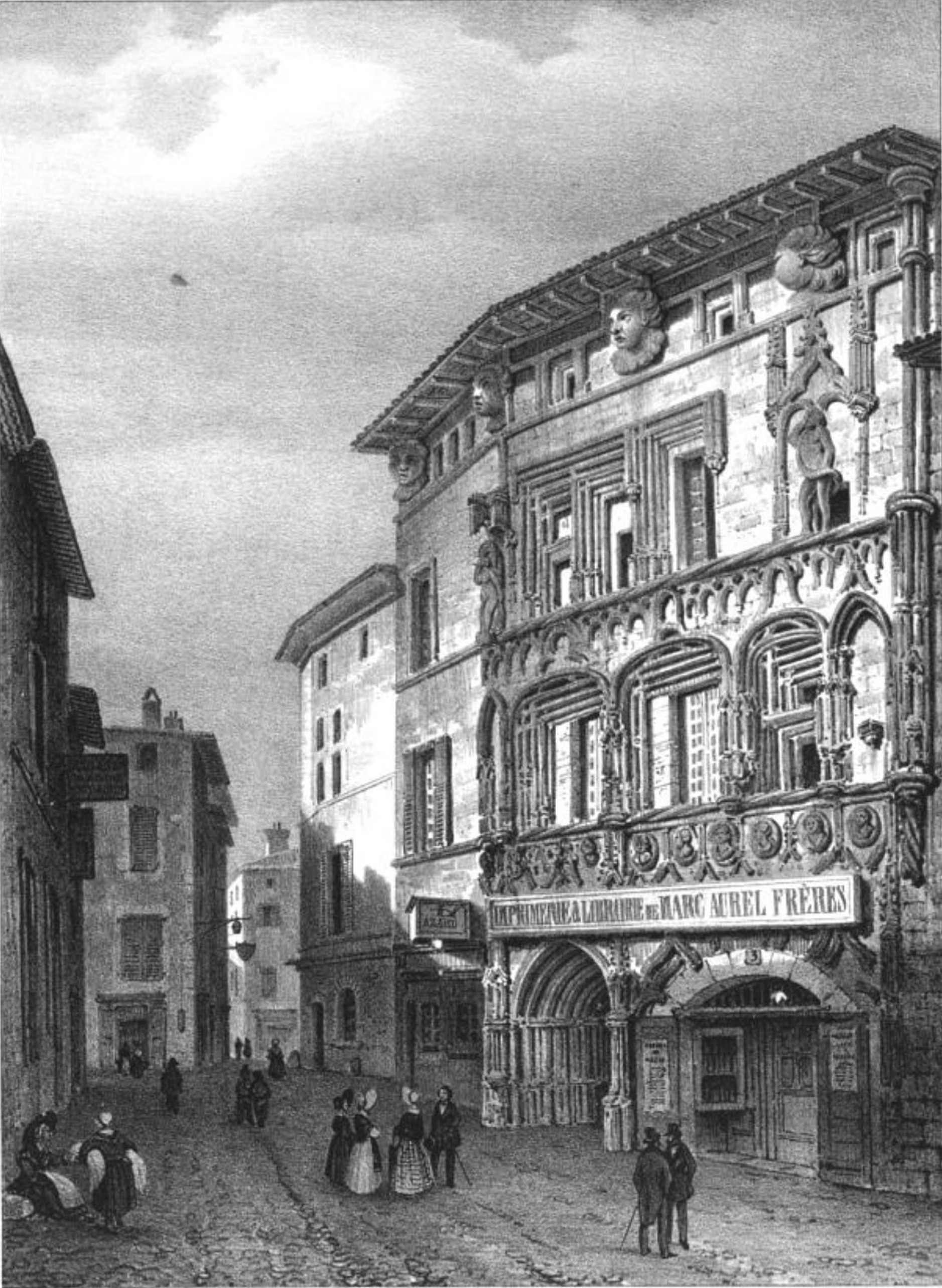 Album du Dauphiné - tome III, lithographie de Valence, Drome